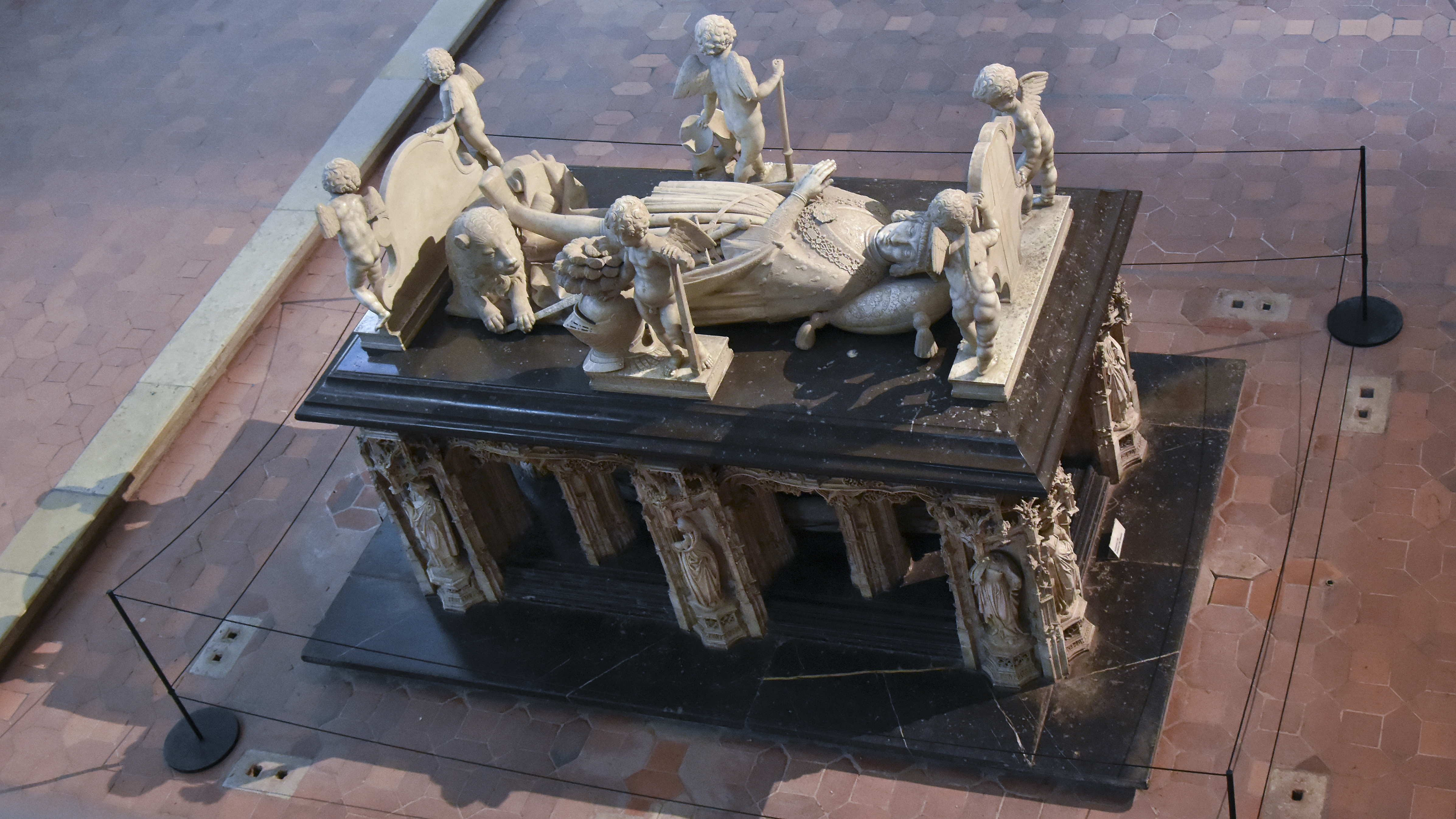 Het grafmonument van Philibert II van Savoye in het Koninklijk klooster van Brou